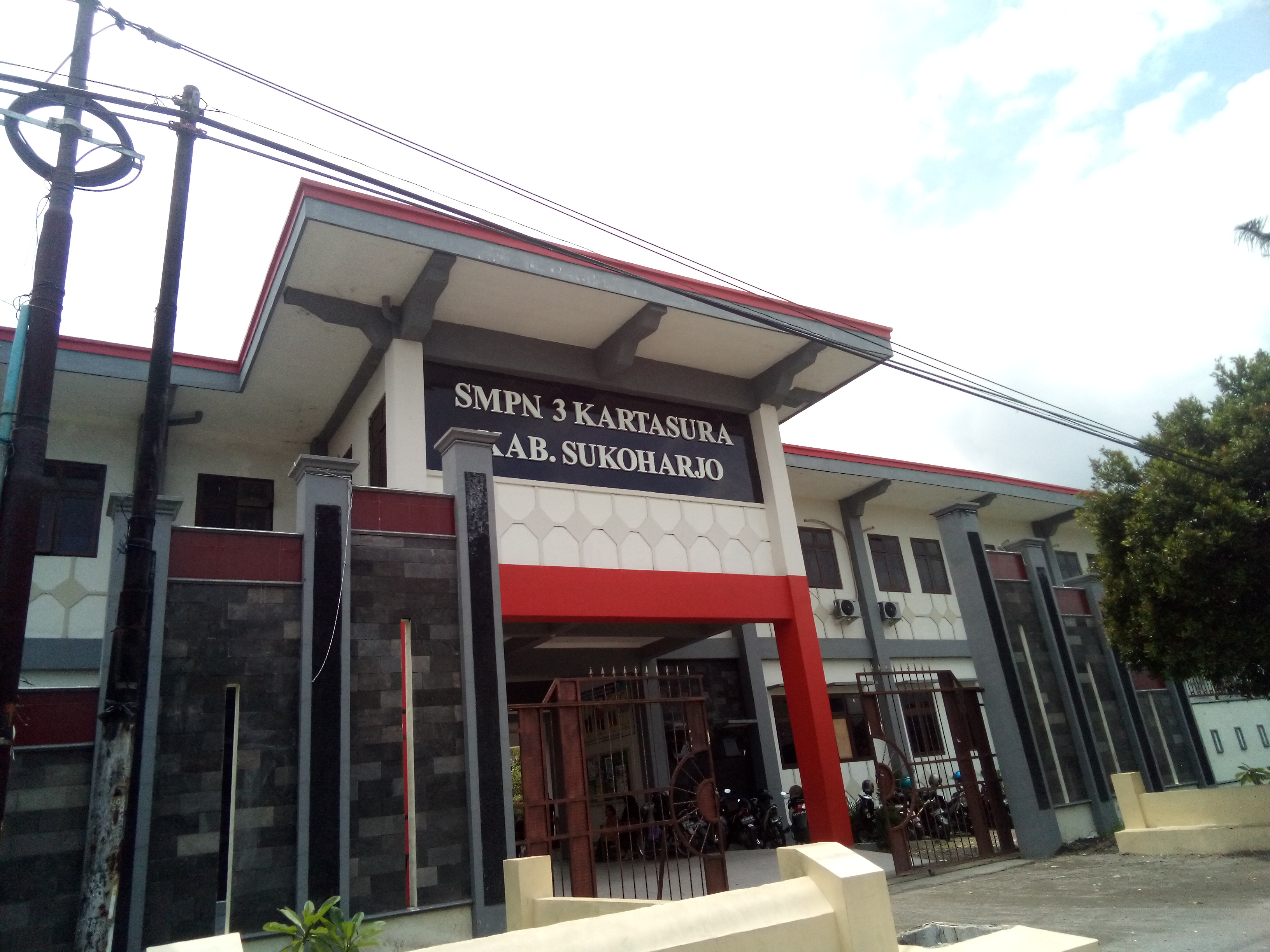 Jawa: SMPN 3 Kartasura ya iku salah sawijining sekolah sing dumunung ana ing kecamatan Kartasura, Sukoharjo